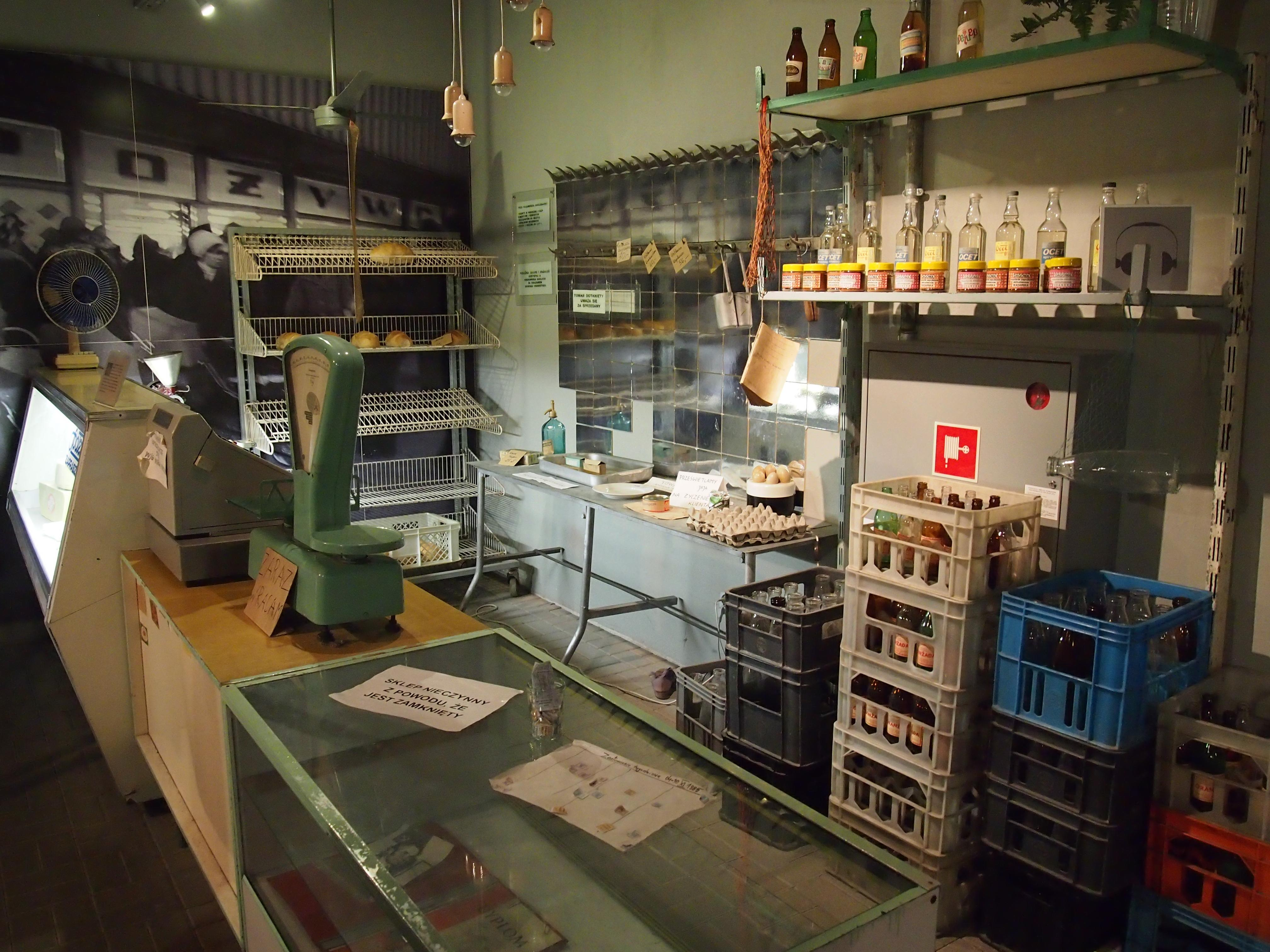 Gdańsk Paths to Freedom Exhibition, rekonstrukcja sklepu spożywczego z czasów PRL-u.